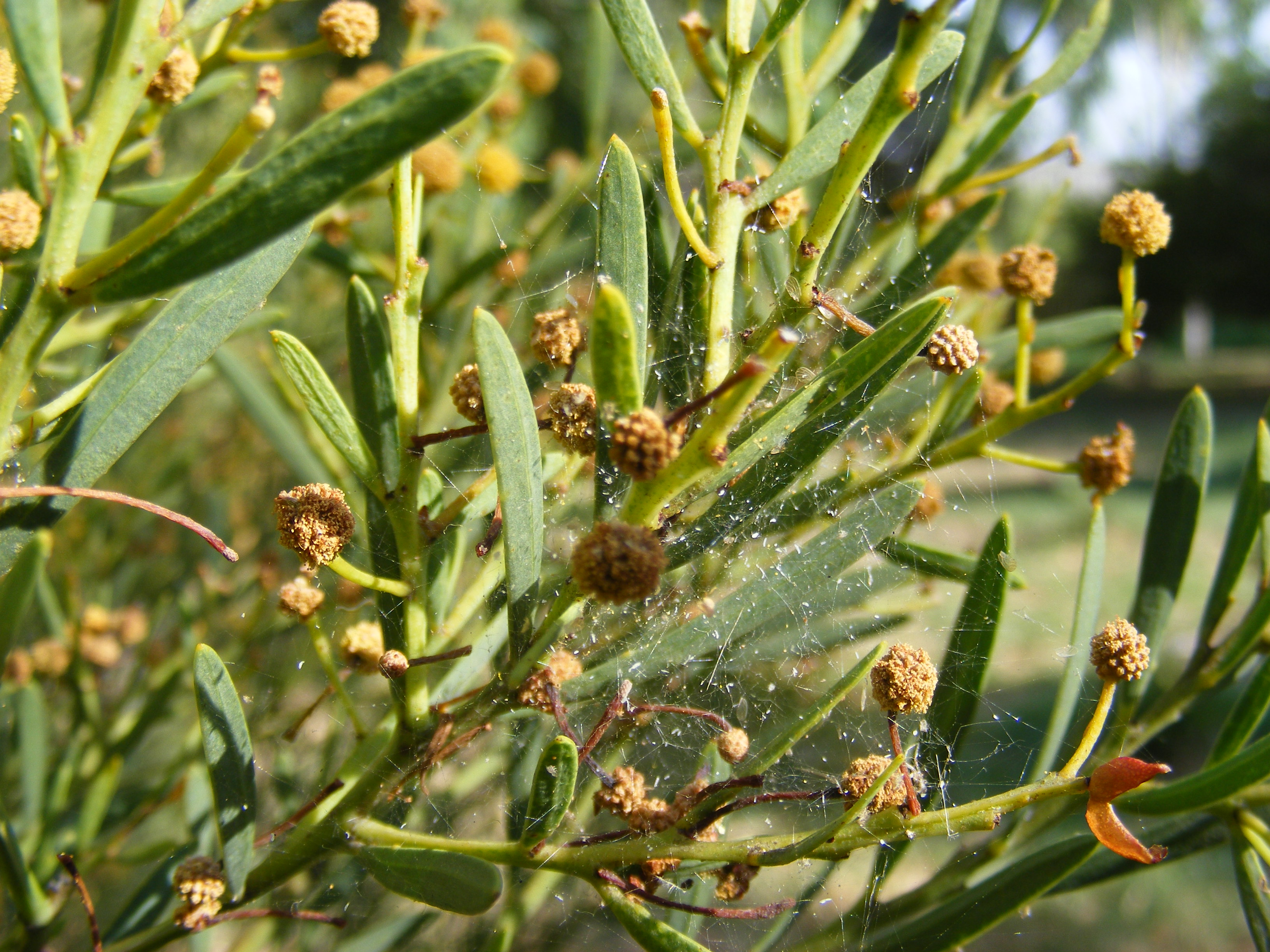 Inflorescències